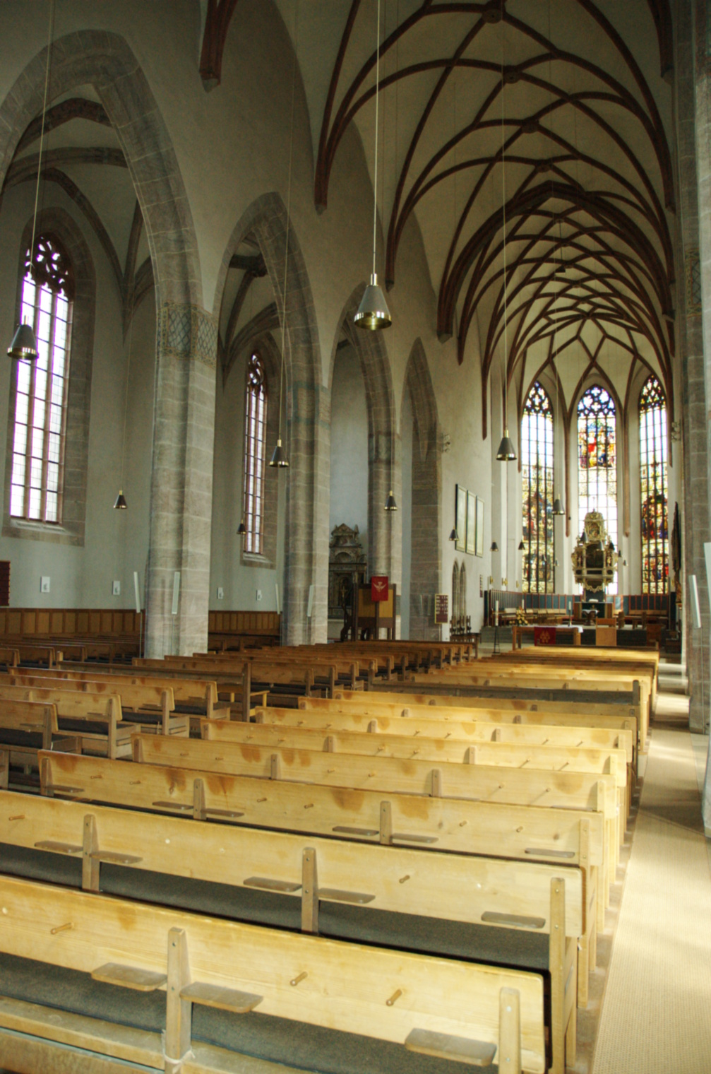 St. Johanniskirche Ansbach